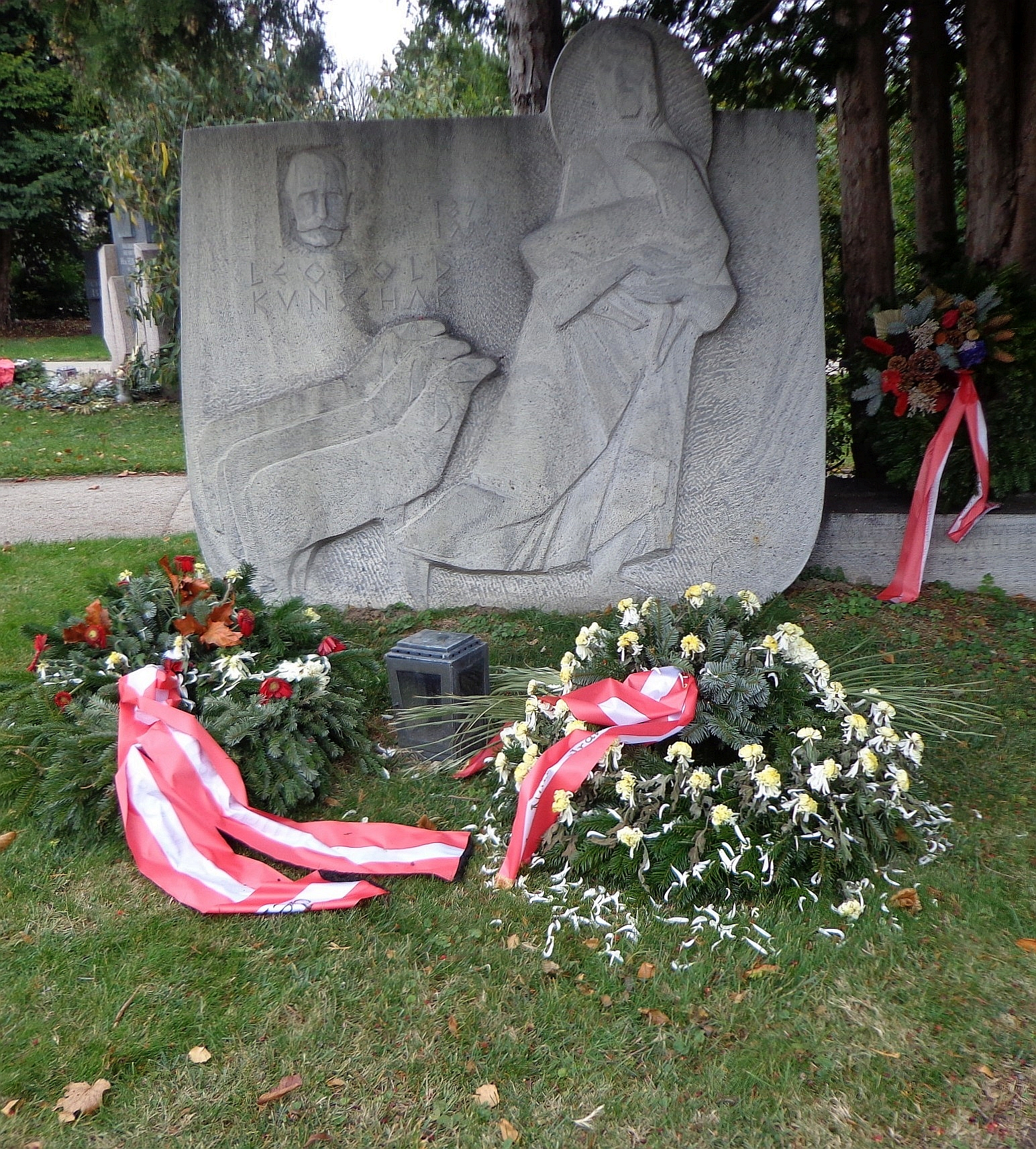 Wiener Zentralfriedhof - Gruppe 14 C, Ehrengrab von Leopold Kunschak